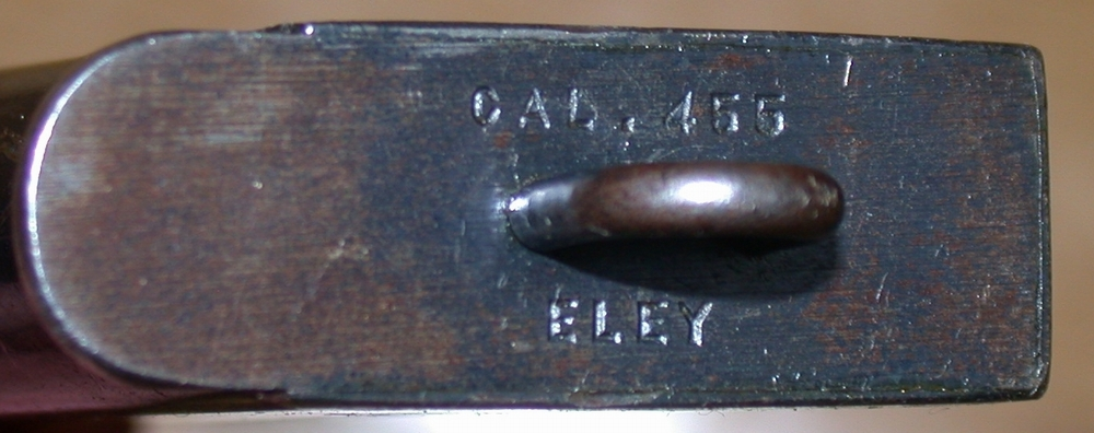 Colt 1911 Magazin, Inschrift "CAL.455 ELEY